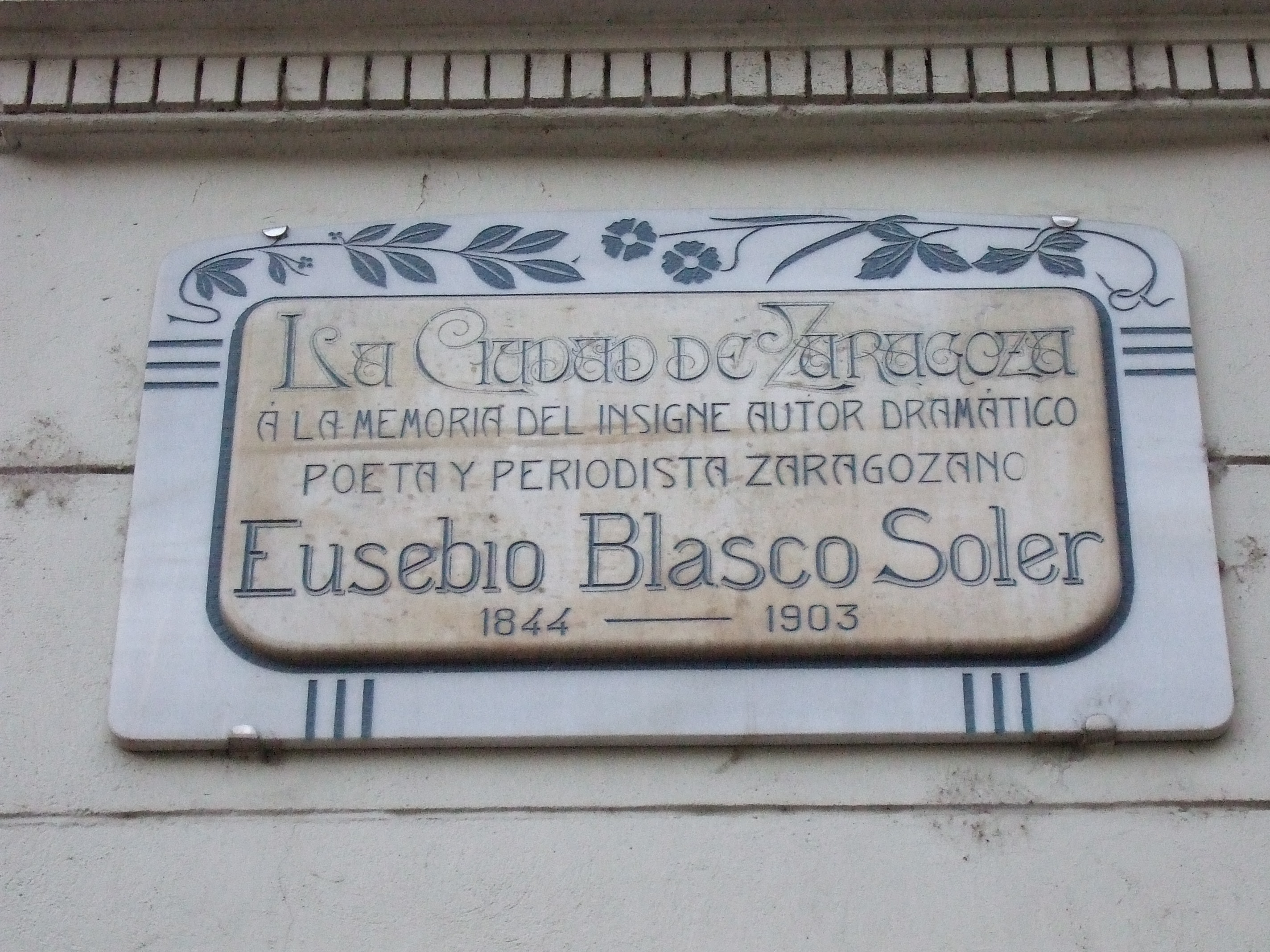 Zaragoza - Placa dedicada a Eusebio Blasco Soler en el Teatro Principal - Texto: "La ciudad de Zaragoza a la memoria del insigne autor dramático, poeta y periodista zaragozano Eusebio Blasco Soler (1844-1903)"